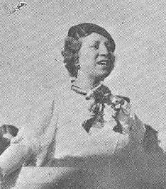 La señorita María Rosa Urraca Pastor.